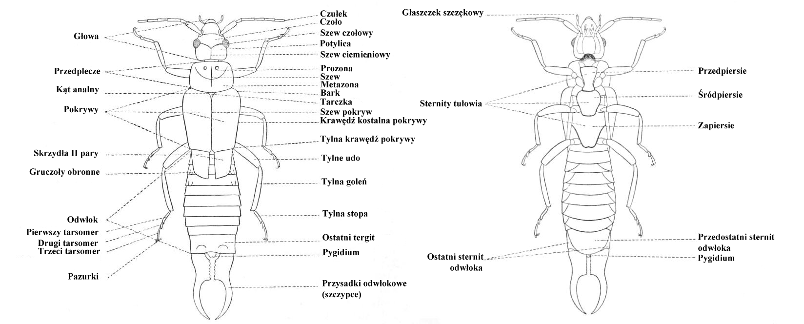 Ilustracja morfologii skorka z Fauna of British India M. Burra z polską legendą.